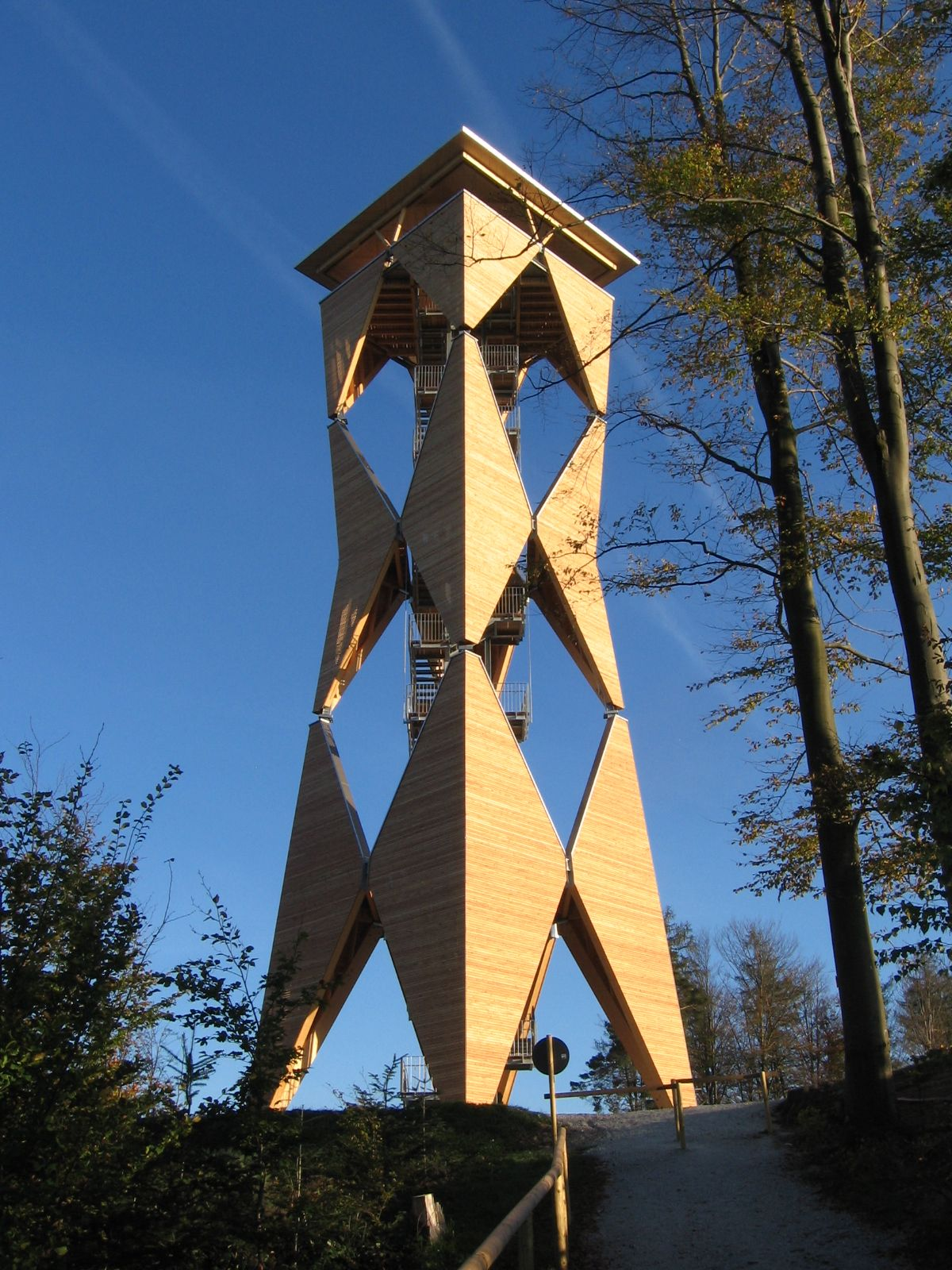 Der fertige Altenbergturm. Blick in Richtung Südost vom Ende des nordwestlichen Anstiegsweges, der kurz zuvor seine steilsten Abschnitte hat.